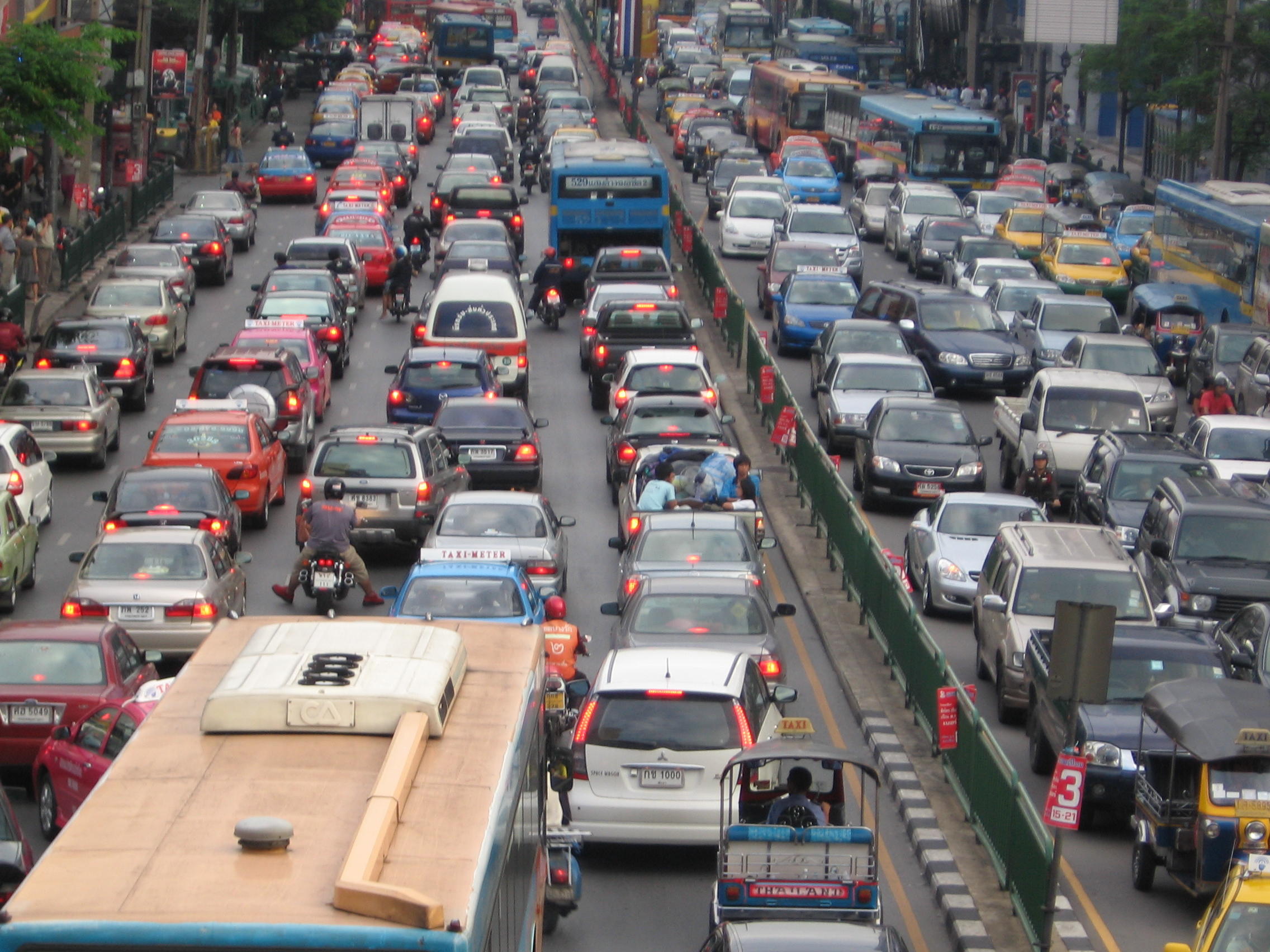 A traffic jam in Bangkok